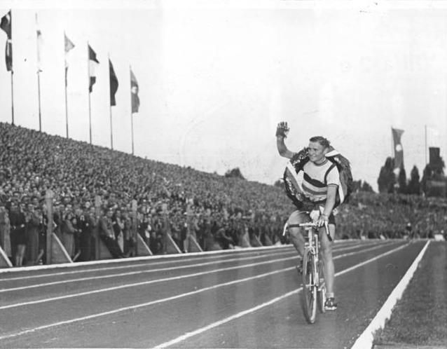 VIII. Friedensfahrt, Joseph Verhelst Zentralbild CAF-V So-Ku 17.5.1955 - Die VIII. Internationale Friedensfahrt Prag-Berlin-Warschau beendet. Am 17. Mai 1955 wurde die letzte Etappe des grossen Rennens von Lodz nach Warschau über 125 km gefahren. UBz: Der Sieger der letzten Etappe: der Belgier Josef Verhelst.